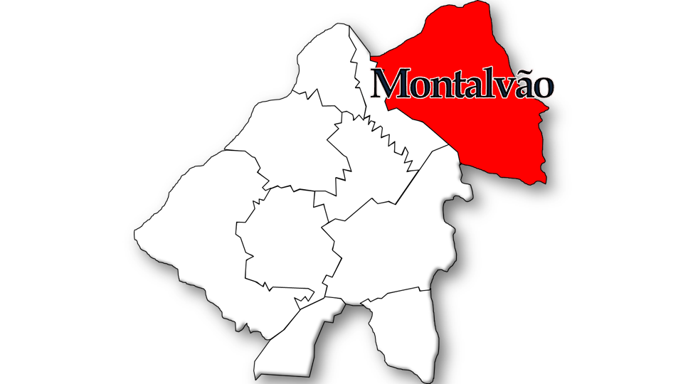 Evolução da População